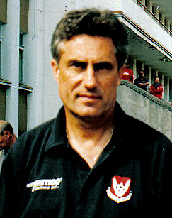 Marek Kusto